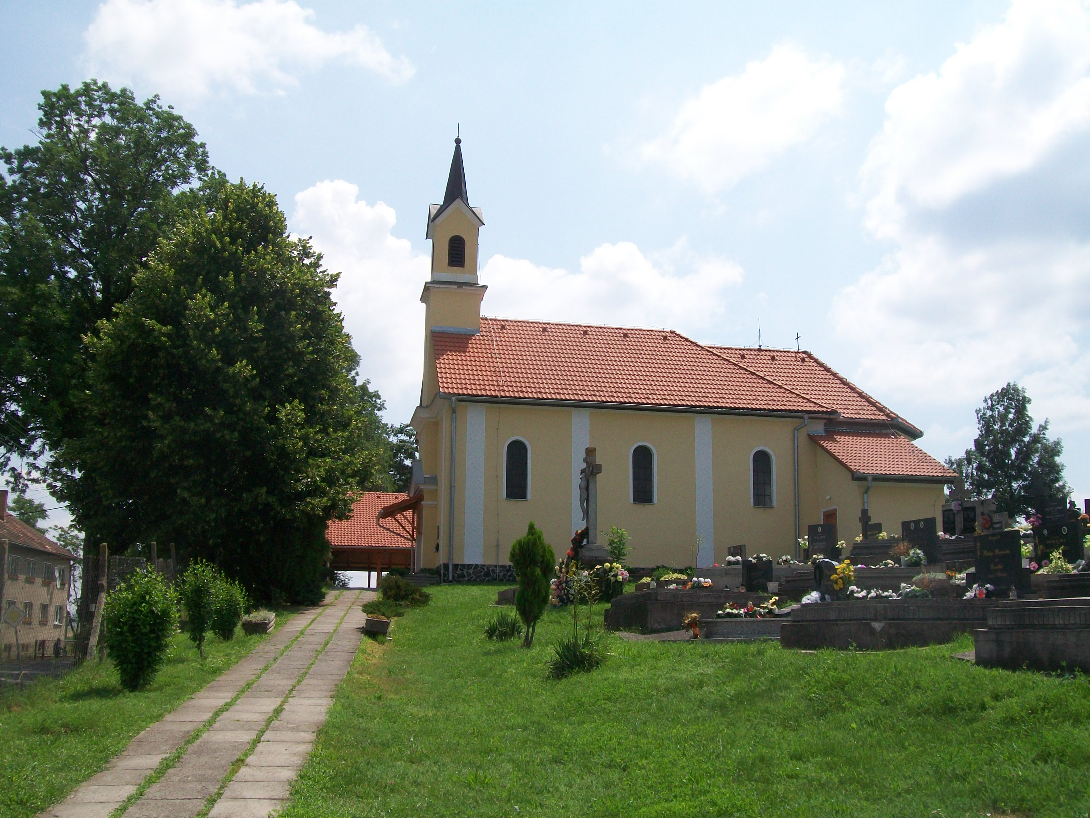 Klasicistický rímskokatolícky Kostol sv. Anjelov strážcov z roku 1846